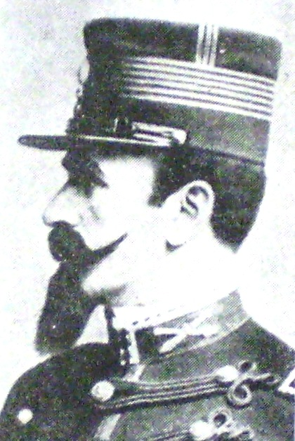 Pablo Ricchieri